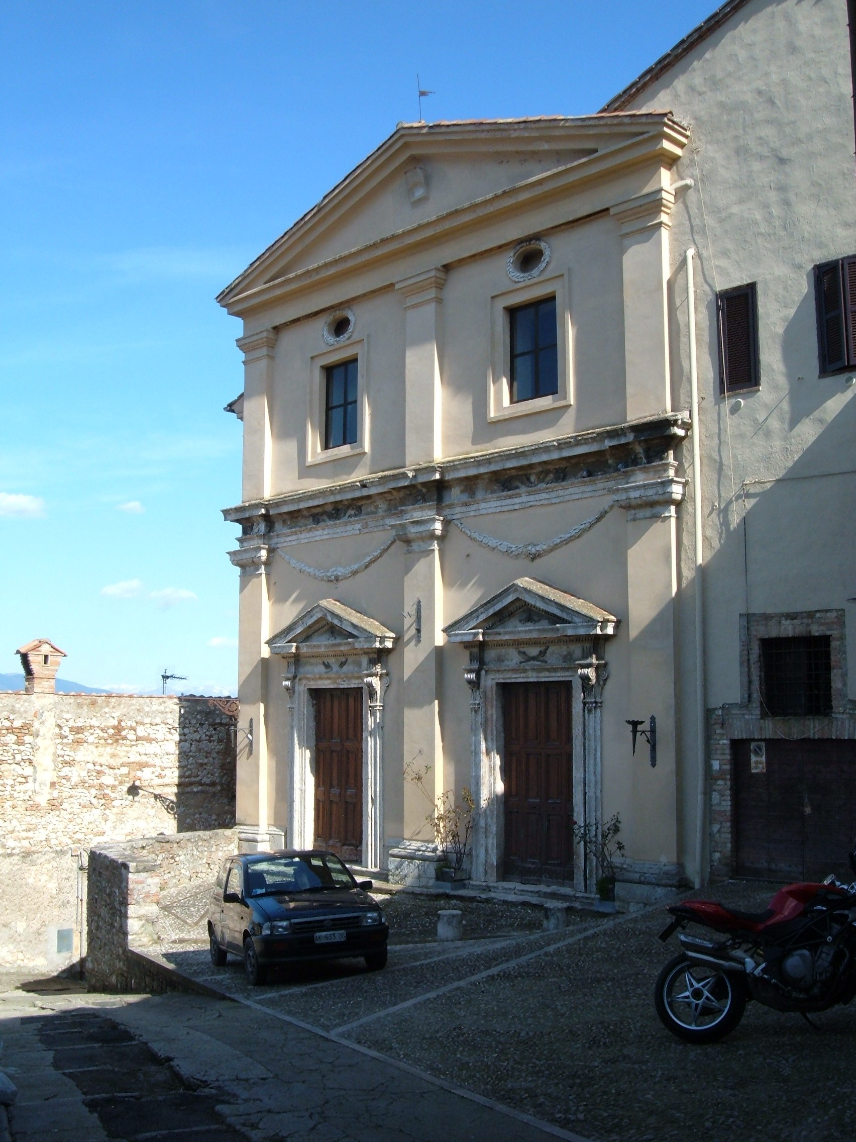 Chiesa di Santa Margherita, a Narni.